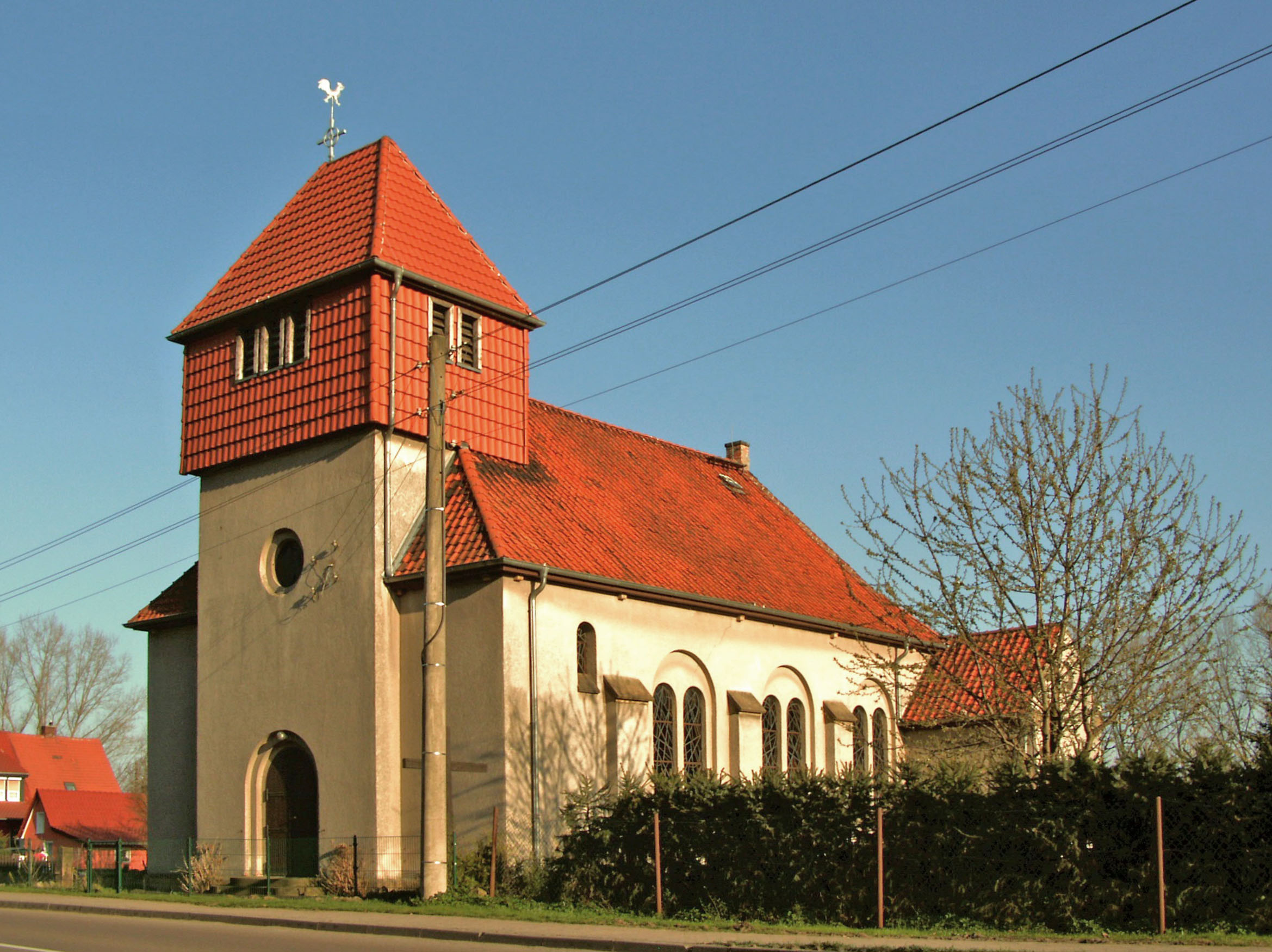 Katholische Kirche St. Norbert in Schermcke, Ortsteil von Oschersleben (Bode)